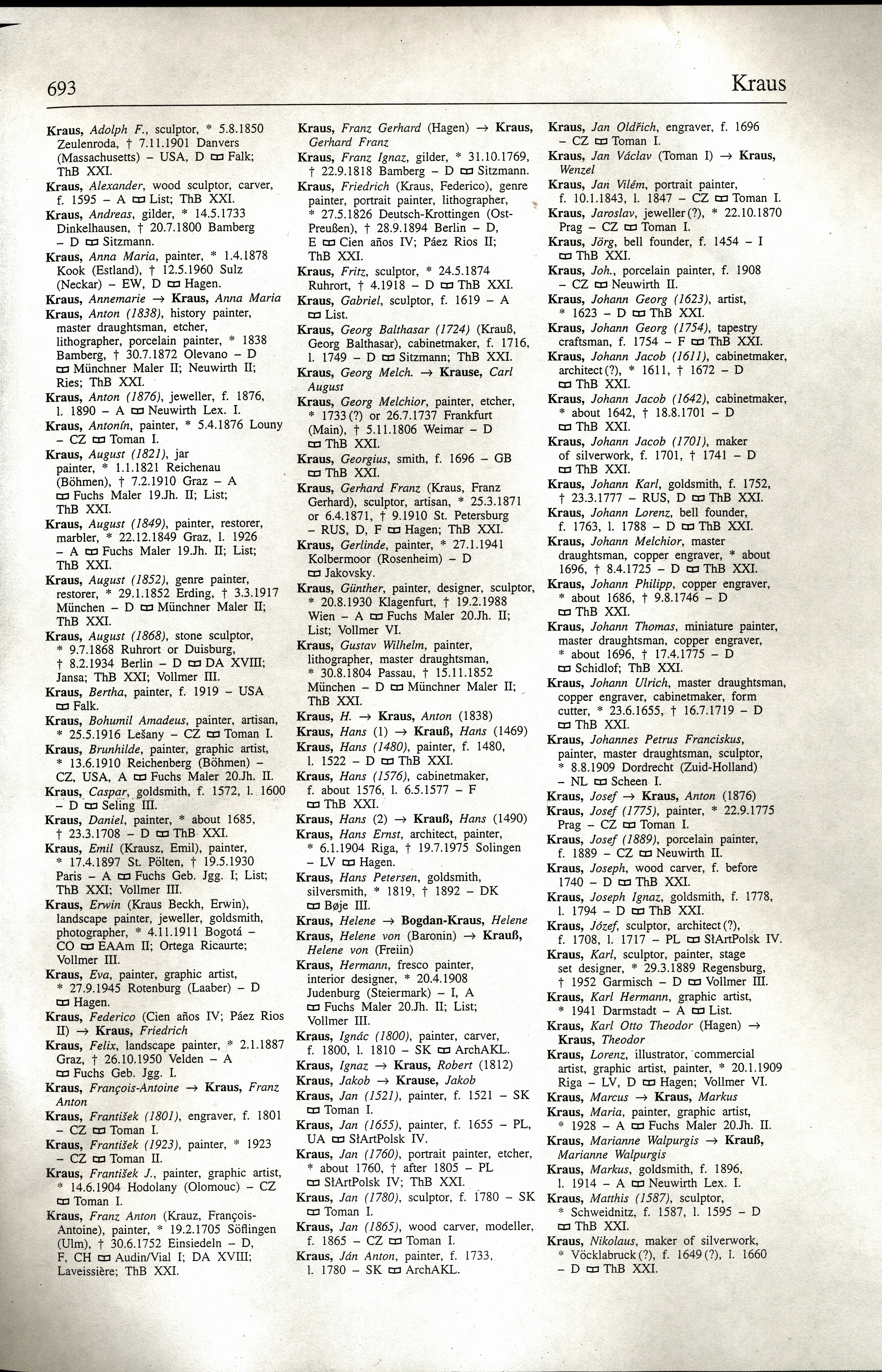 Allgemeines Künstlerlexikon Bio-Bibliographischer Index A-Z, Band 5, S. 693 Kraus, Józef, sculptor, architect f. 1708, l. 1717 - PL, Słownik artystów polskich IV